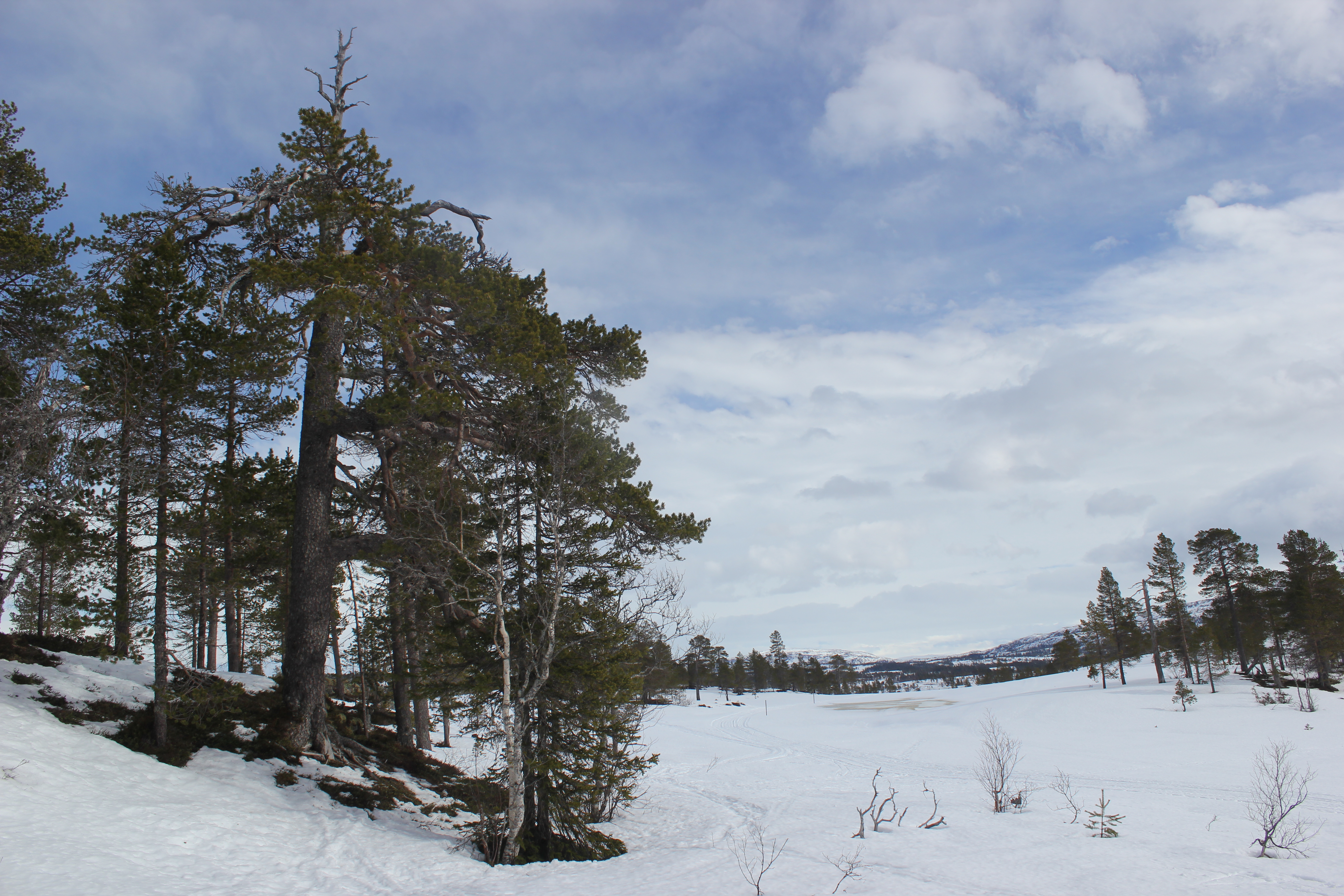 Foto: Lars Bugge Aarset